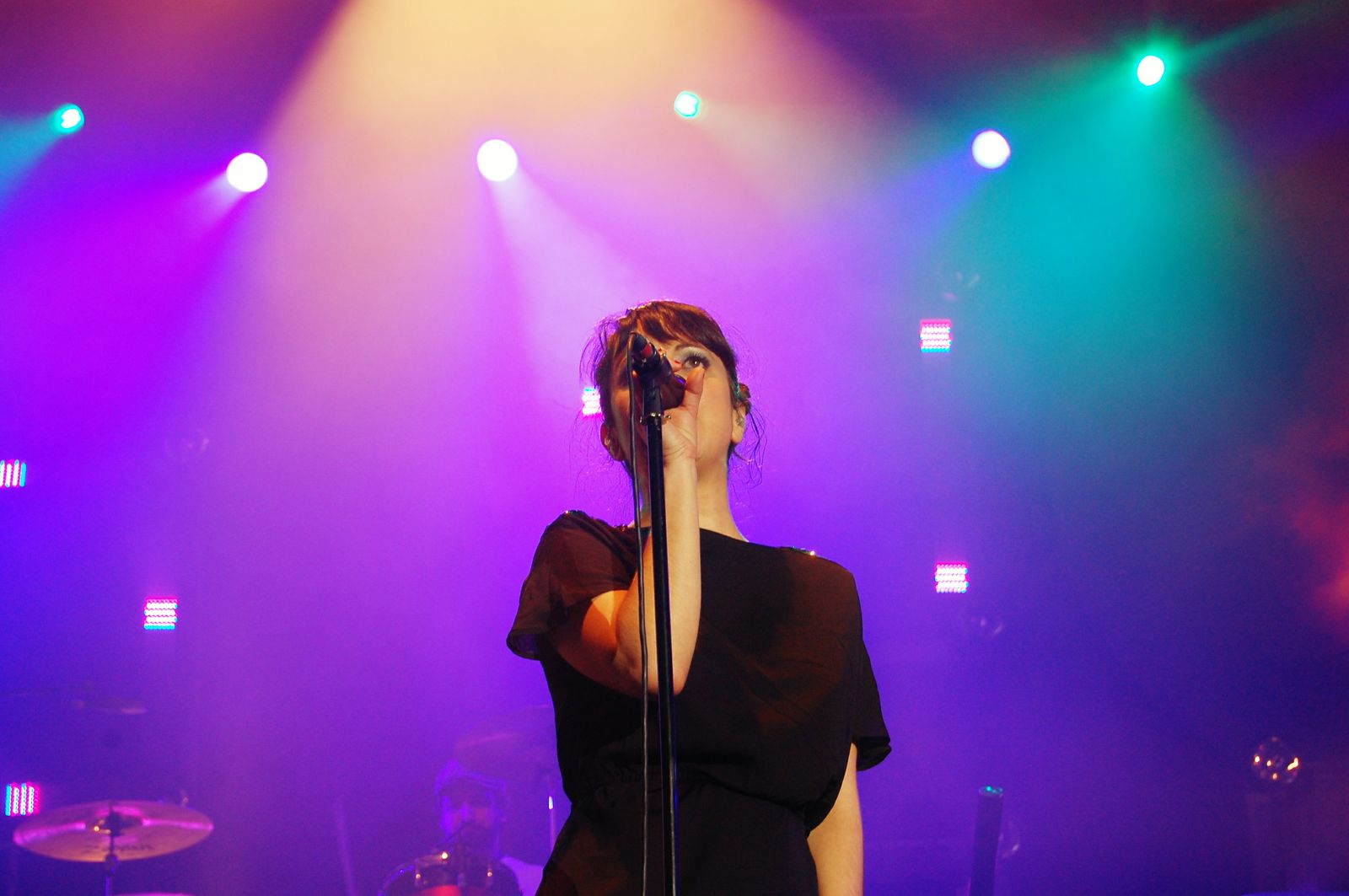 Nena Daconte - concierto final de gira Retales de Carnaval